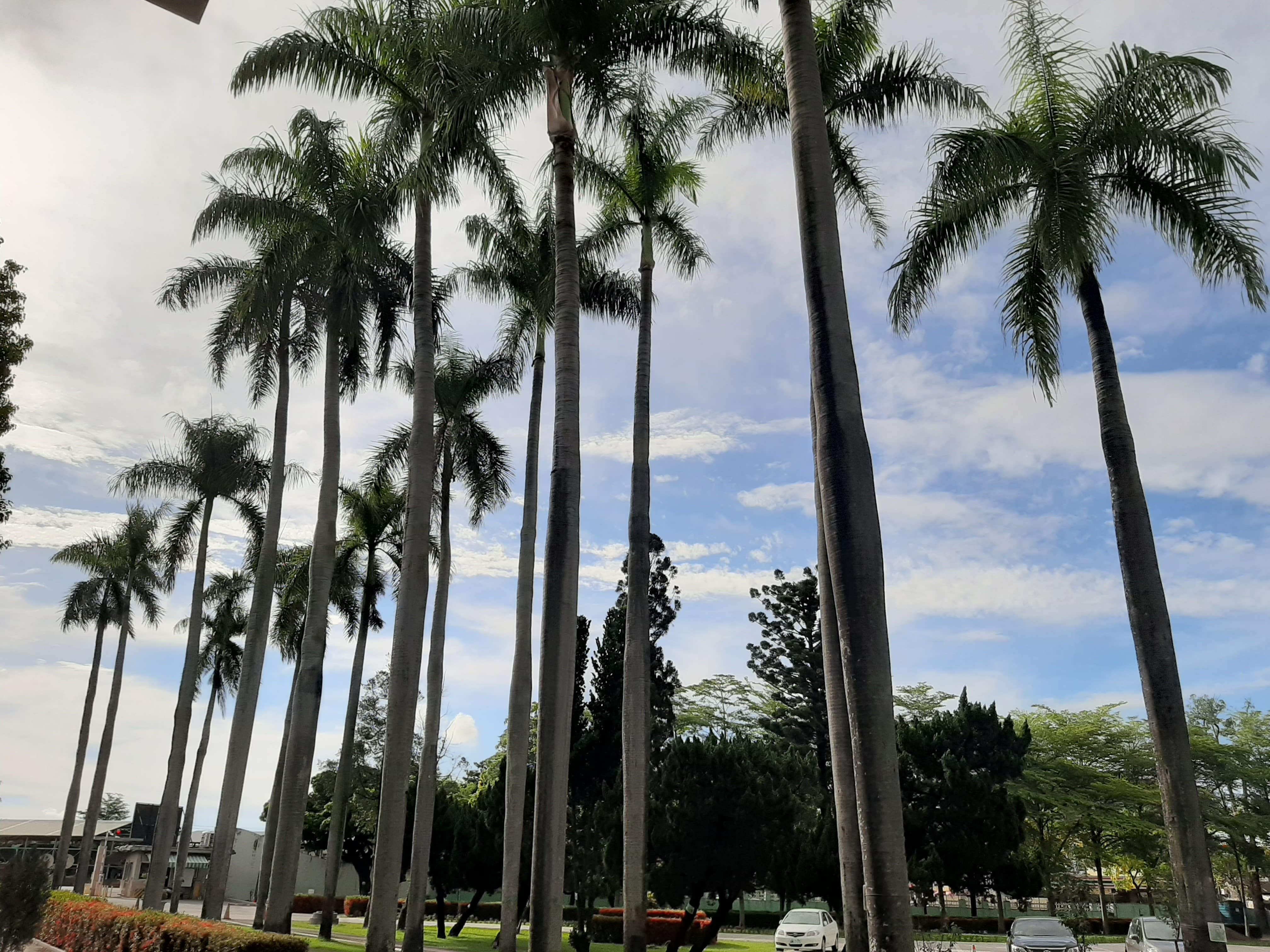 中文（台灣）: 校園中的椰林大道